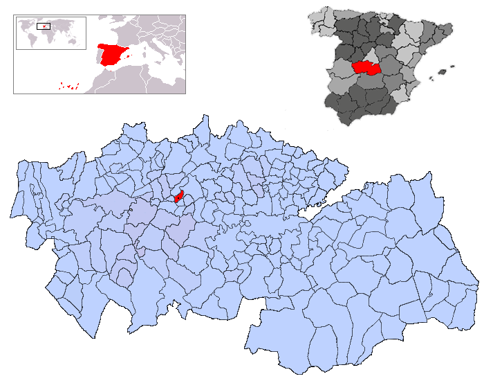 Domingo Pérez en la provincia de Toledo